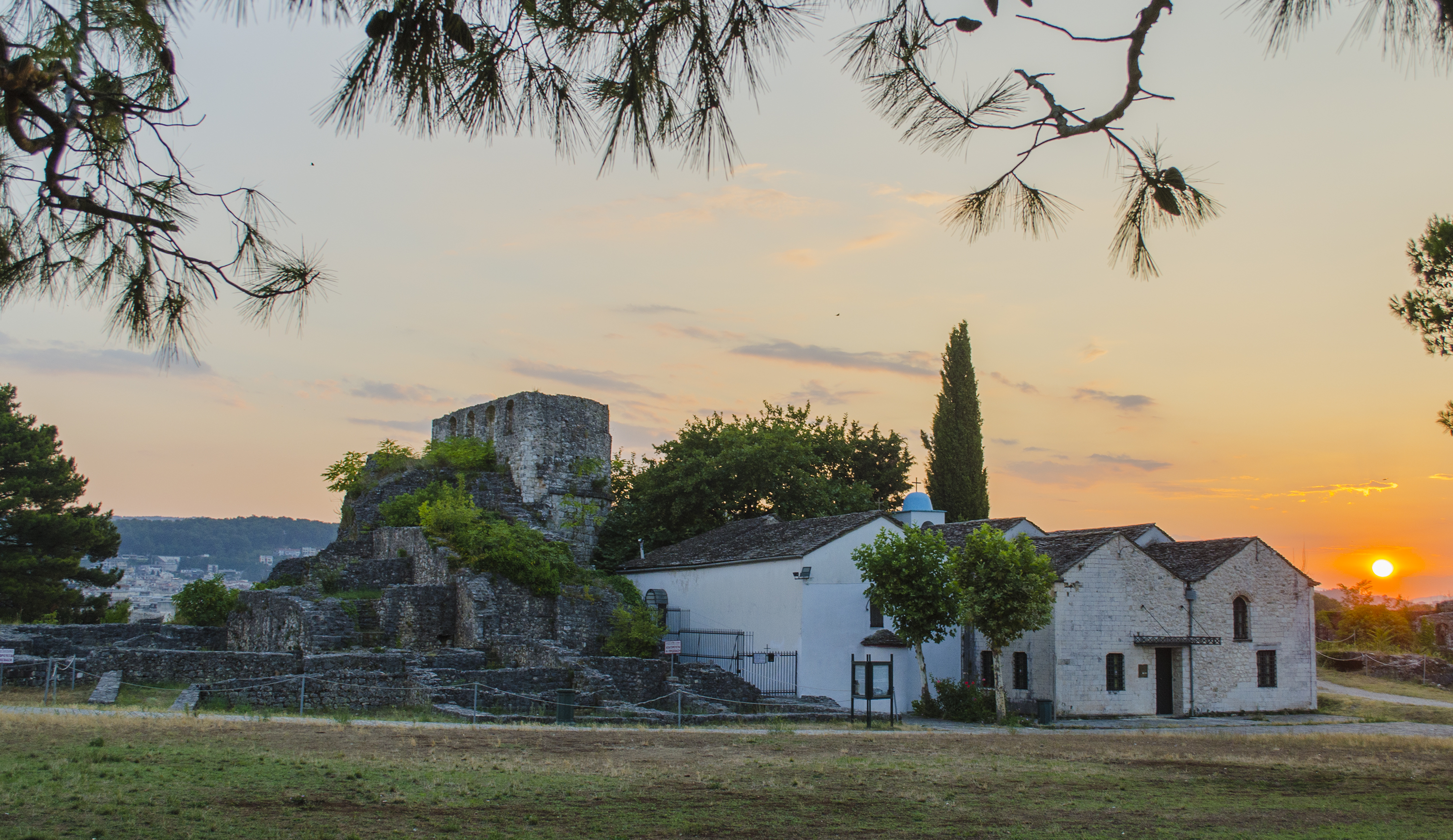 Ο Πύργος του Βοημούνδου, Μουσείο Αργυροχρυσοχοΐας και η εκκλησία του Ταξιάρχη Μιχαήλ.«Μαστιλίτσα»